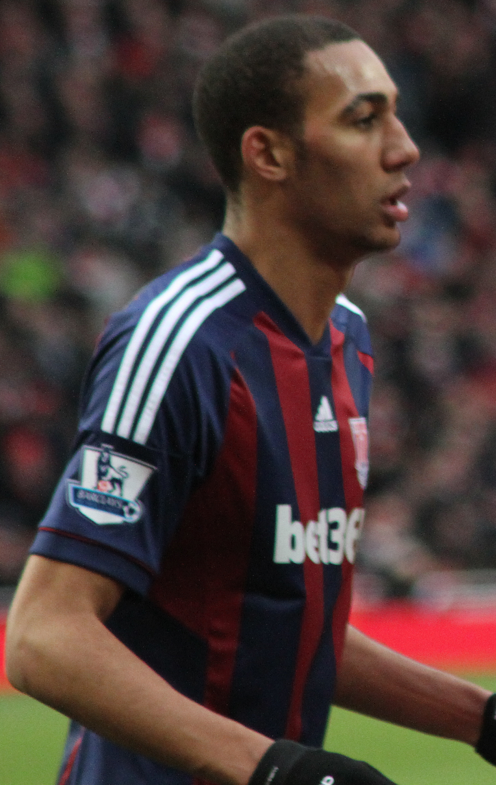 Arsenal vs Stoke, February 2013.